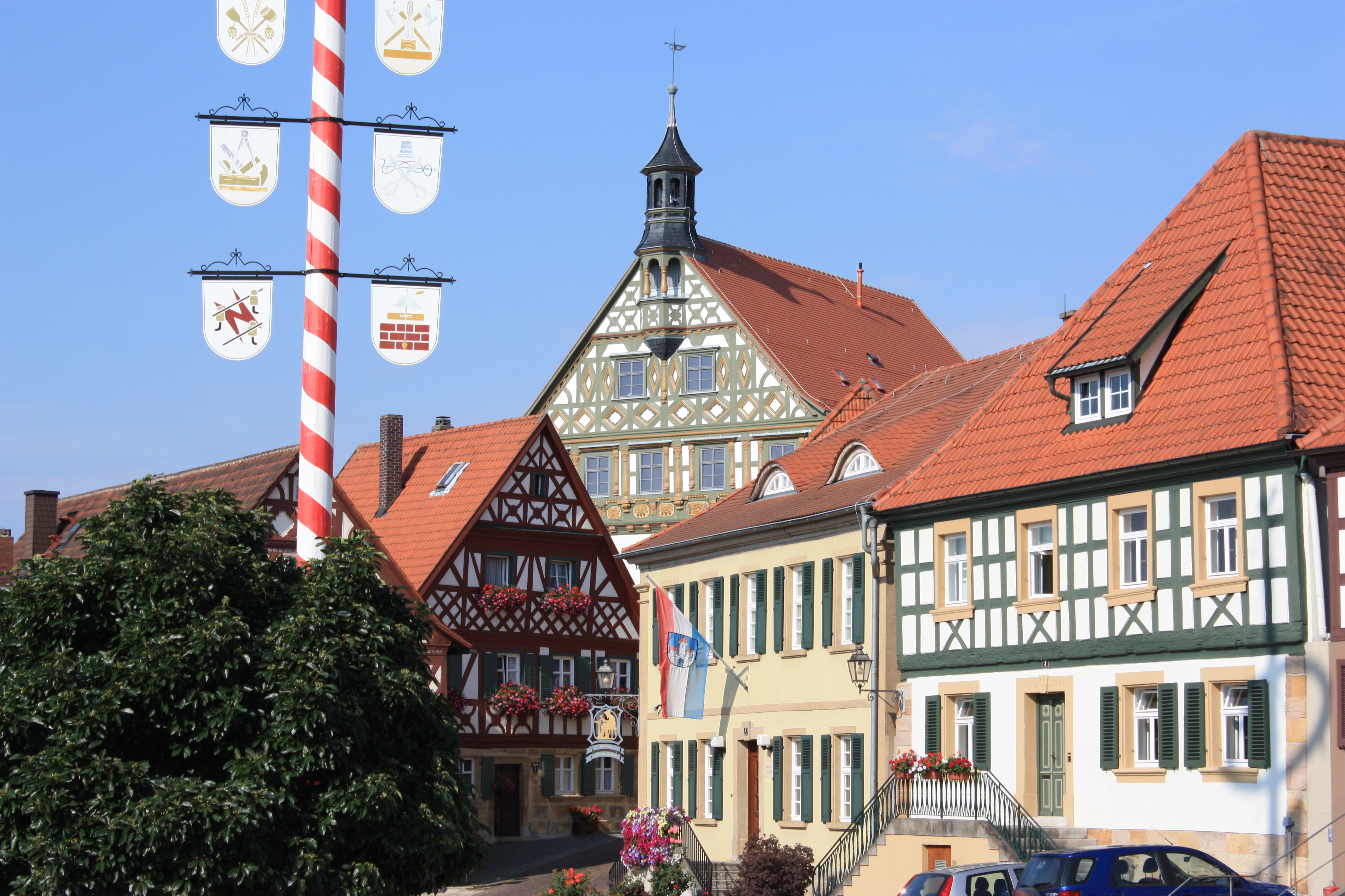 "Offizielles" Bild der Stadt Burgkunstadt von der historischen Häuserzeile am Markzplatz mit Schustermuseum; oben im Hintergrund das Rathaus, kurz nach Abschluss der Renovierungsarbeiten.